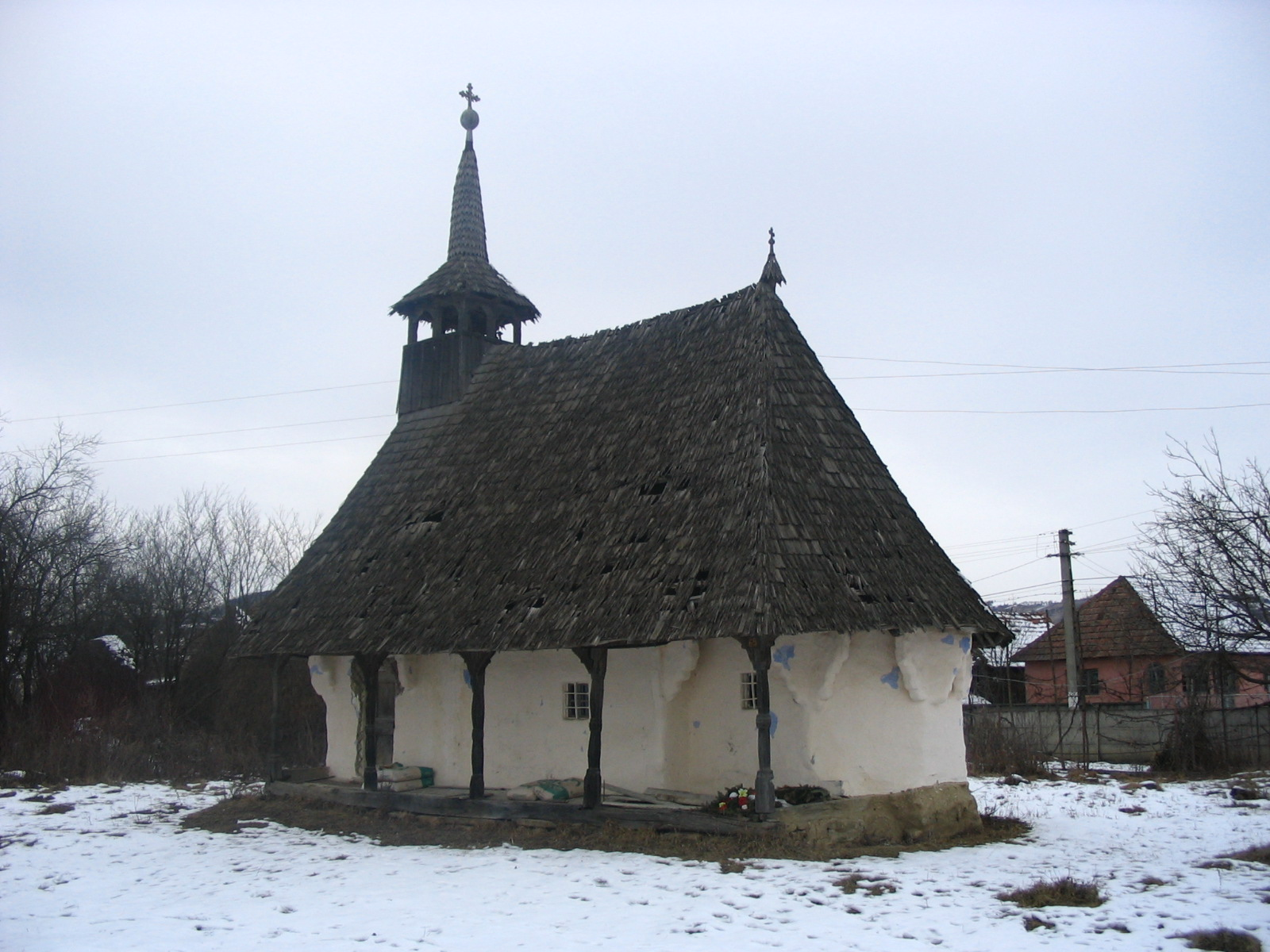 Biserica de lemn din Bălan Cricova, judeţul Sălaj, în anul 2005, înainte de restaurare.